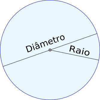 a circle